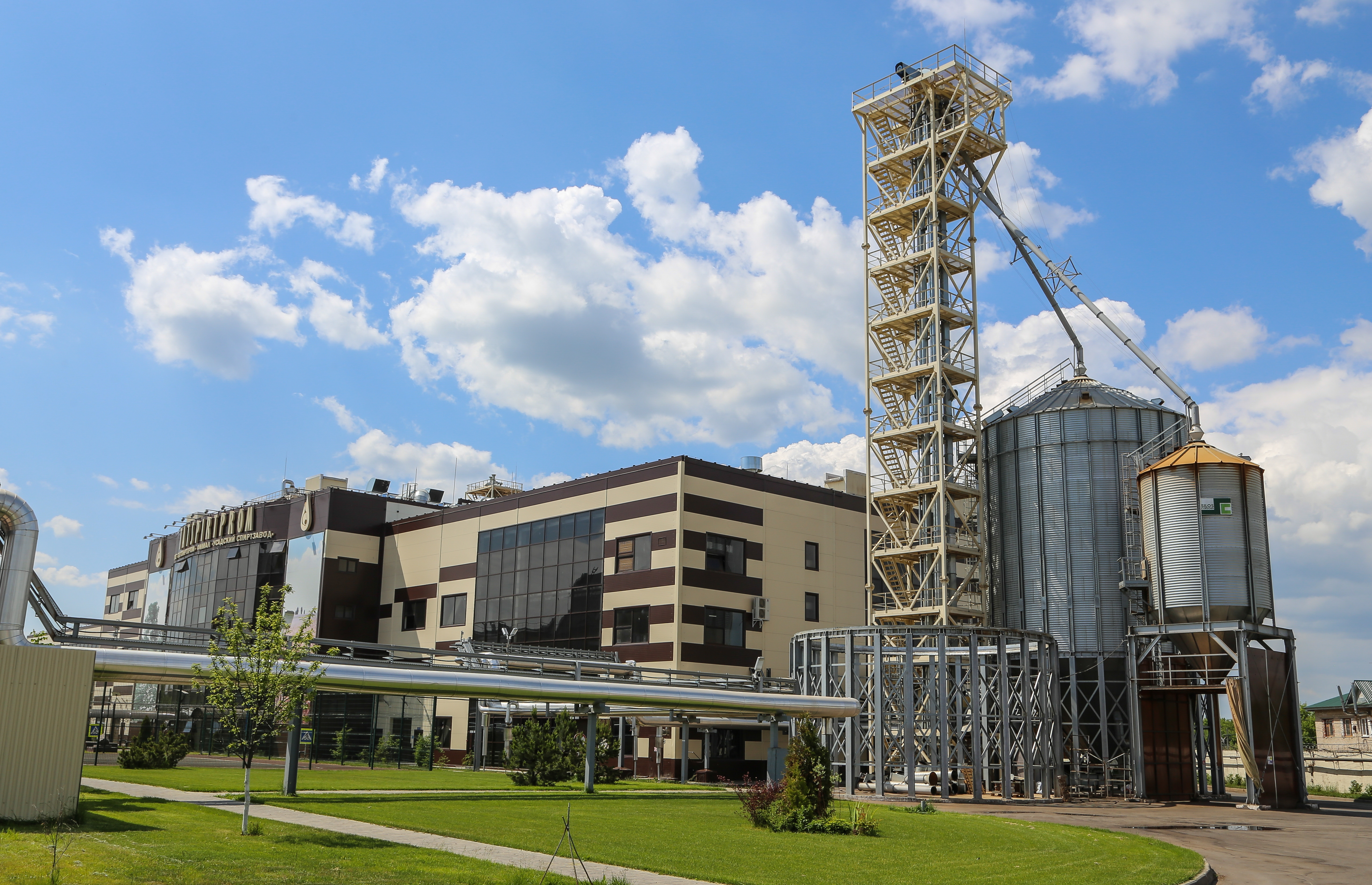 Усадский СЗ